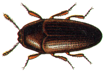 Throscus dermestoides